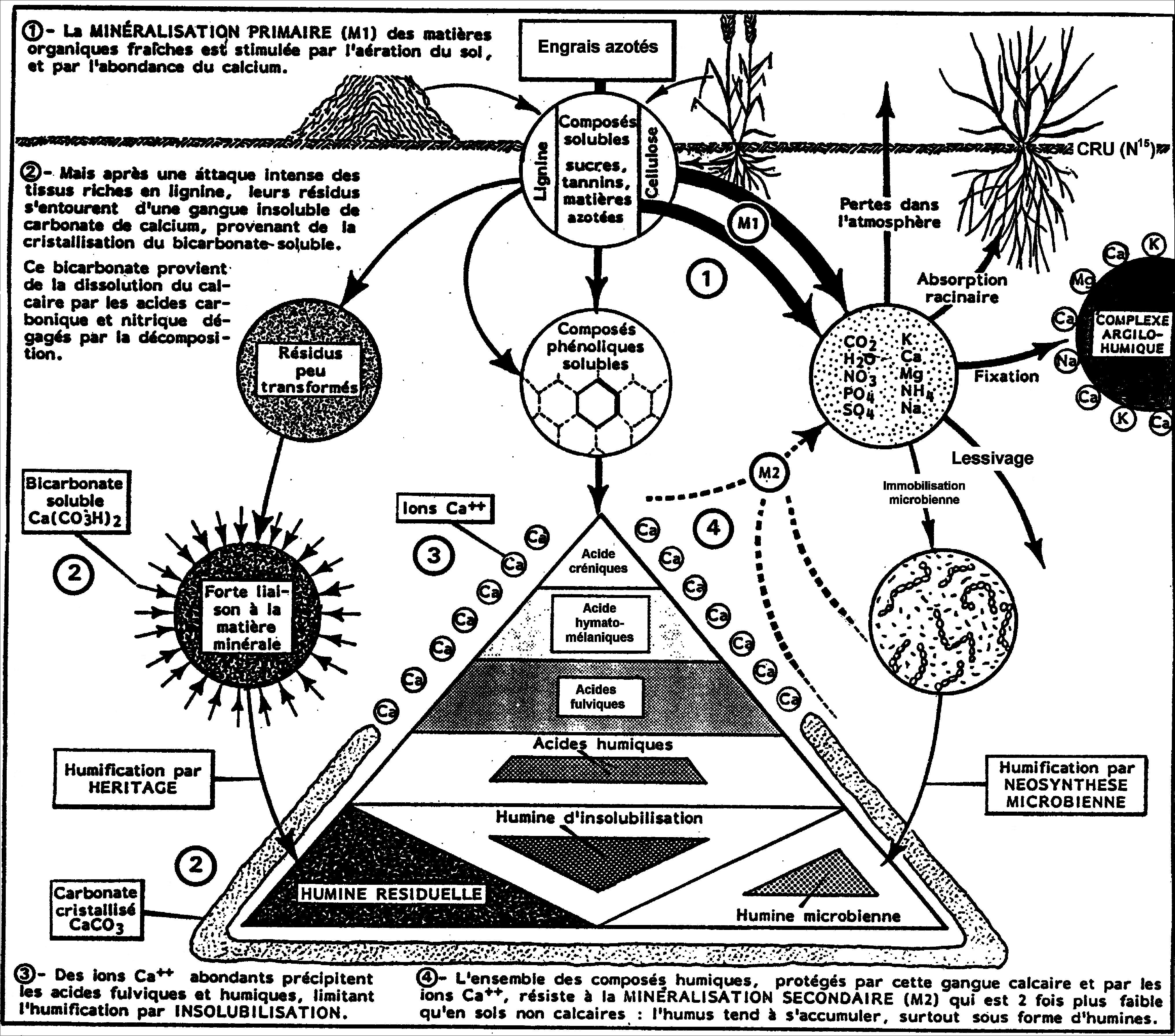 Evolution de l’humus après apport de matériaux organiques et d’engrais azotés.